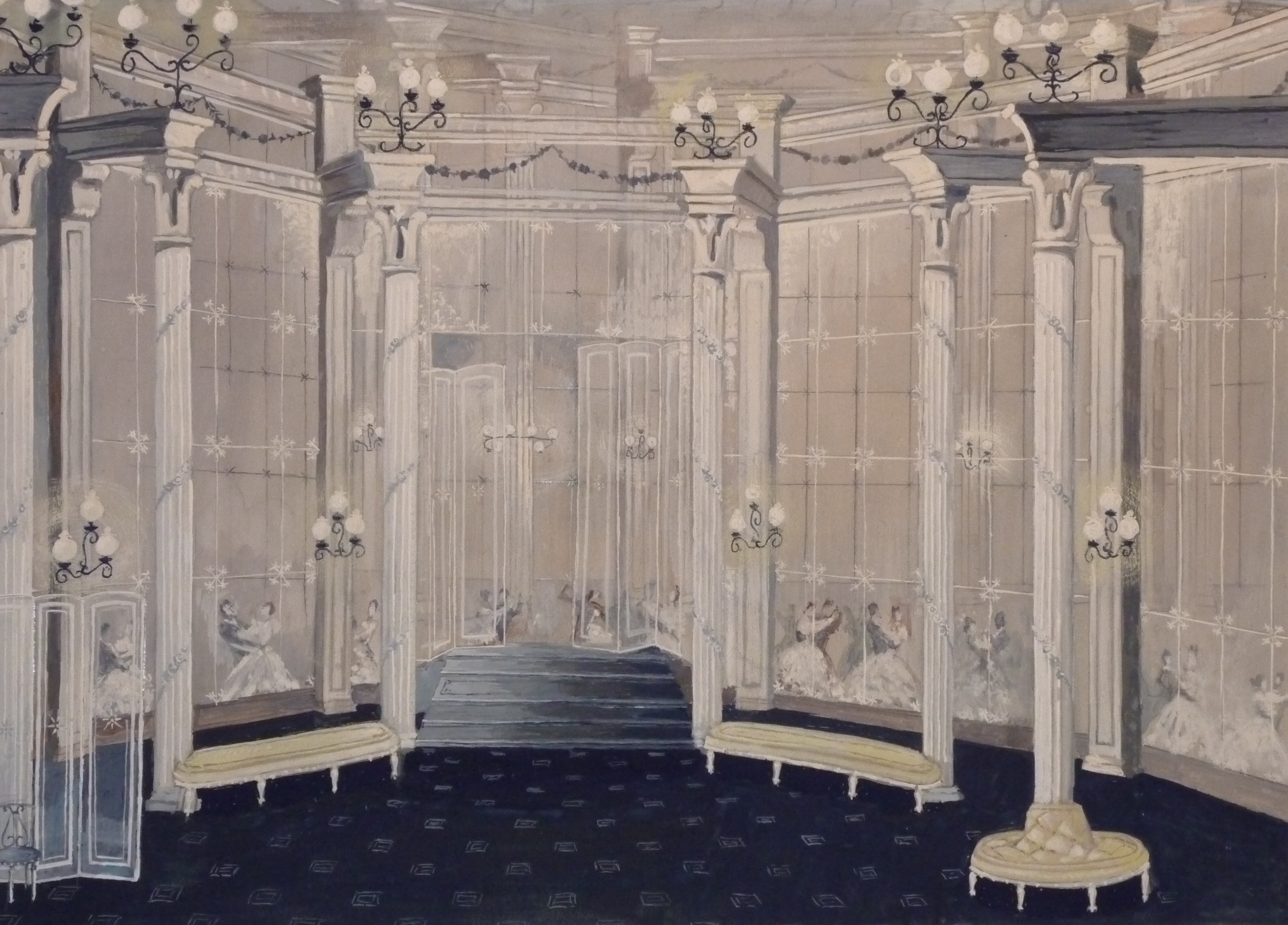 Bühnenbildentwurf von Helmut Jürgens für "Arabella" von R. Strauss, Aufführung München 1952